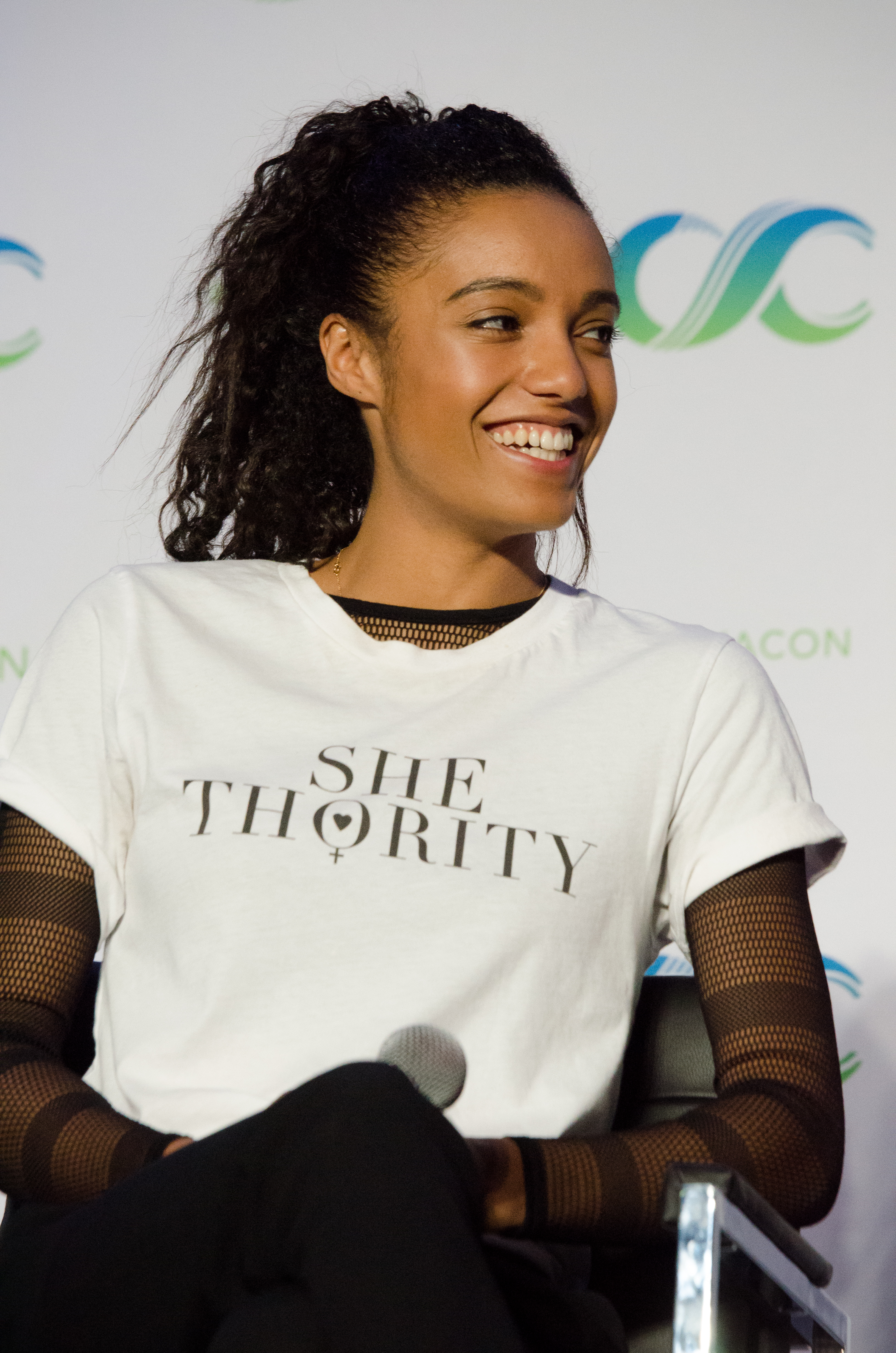 Maisie Richardson-Sellers